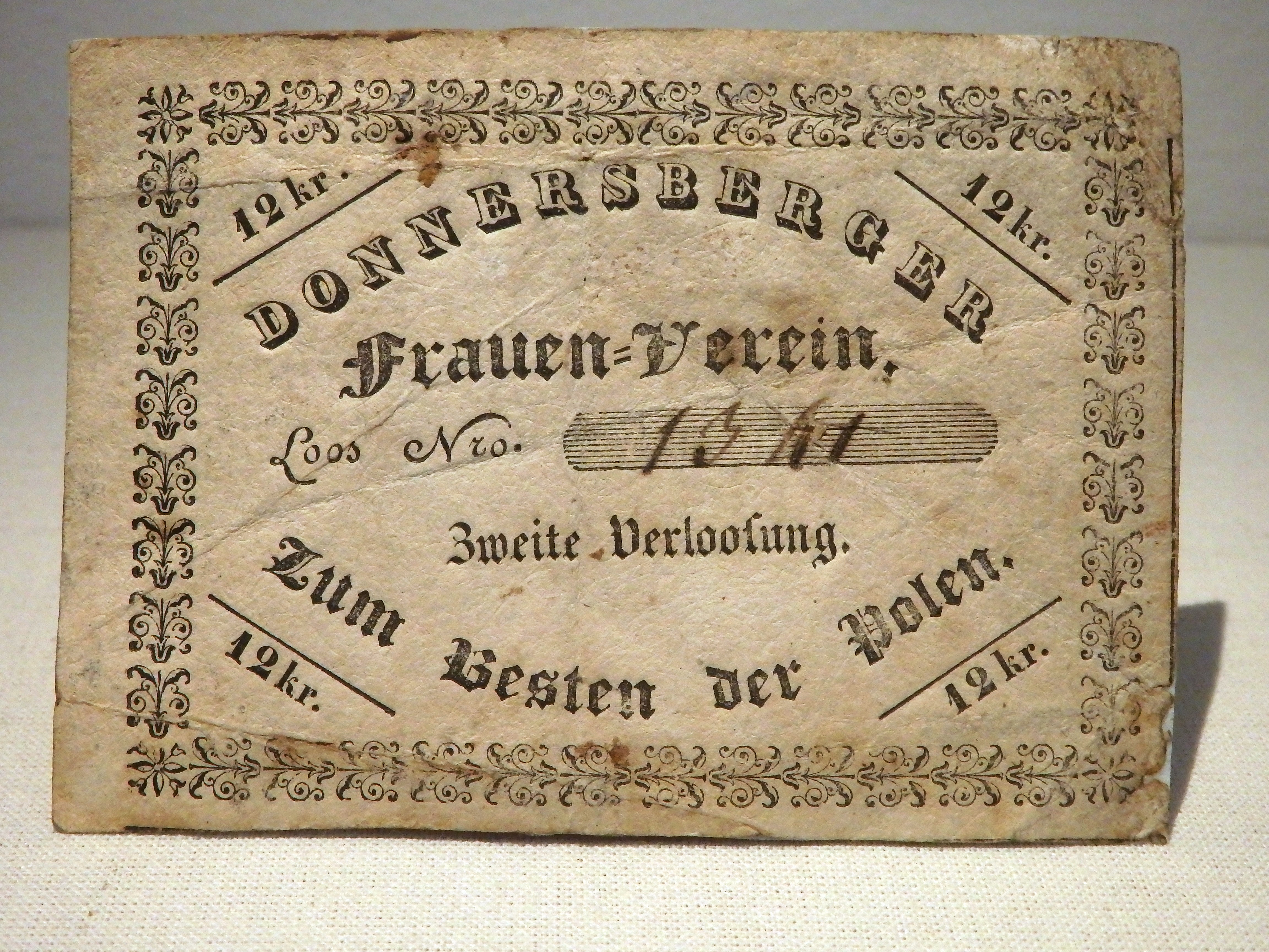 Los einer Verlosung des Donnersberger Frauenvereins über 12 Kreuzer aus dem Jahr 1831 "Zum Besten der Polen", Stadtmuseum Speyer